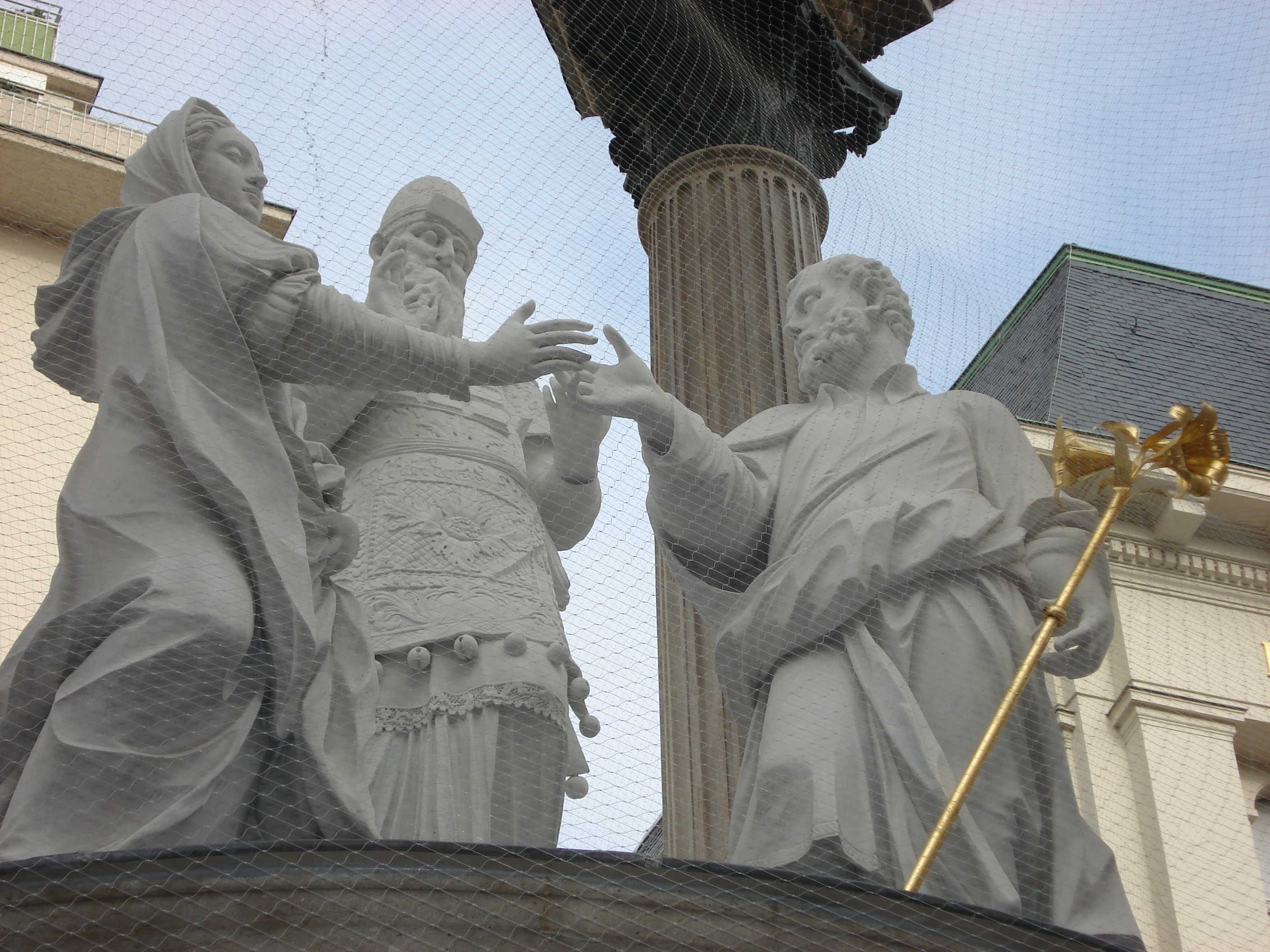 Vermählungsbrunnen3